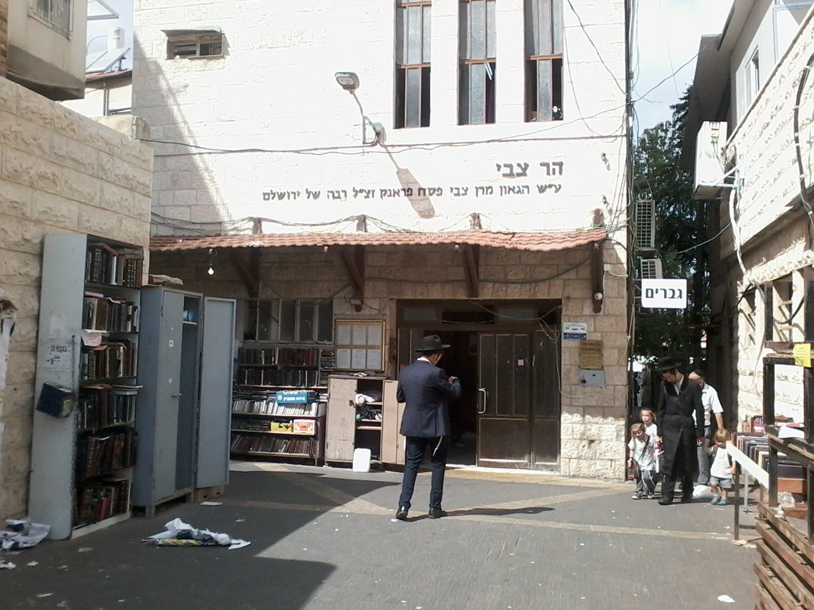 בית הכנסת "הר צבי", על שם ספרו של הרב פרנק, ברחוב צפניה בירושלים (אוגוסט 2018)